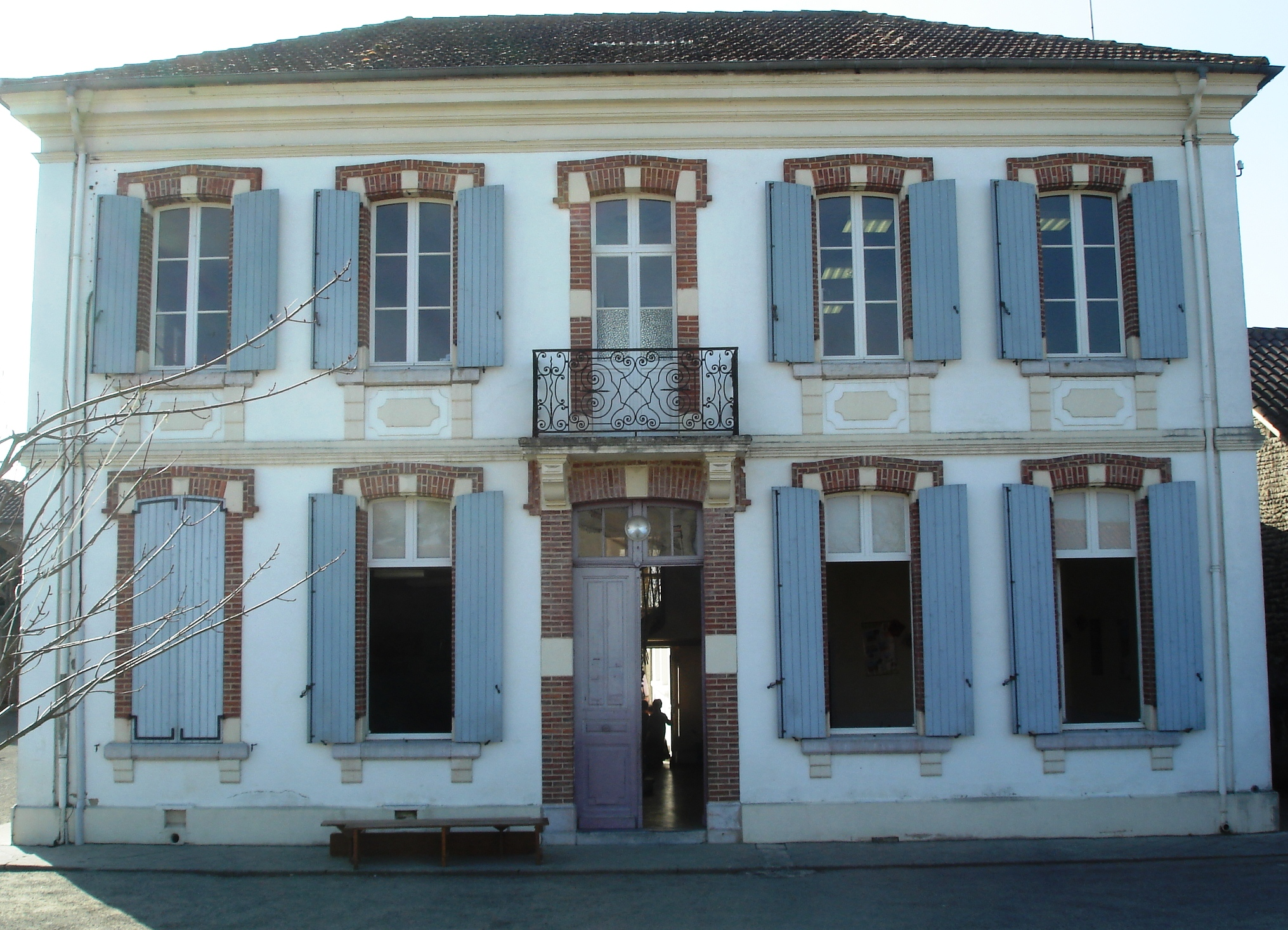 Ecole de Labatut-Rivière, Hautes-Pyrénées, France